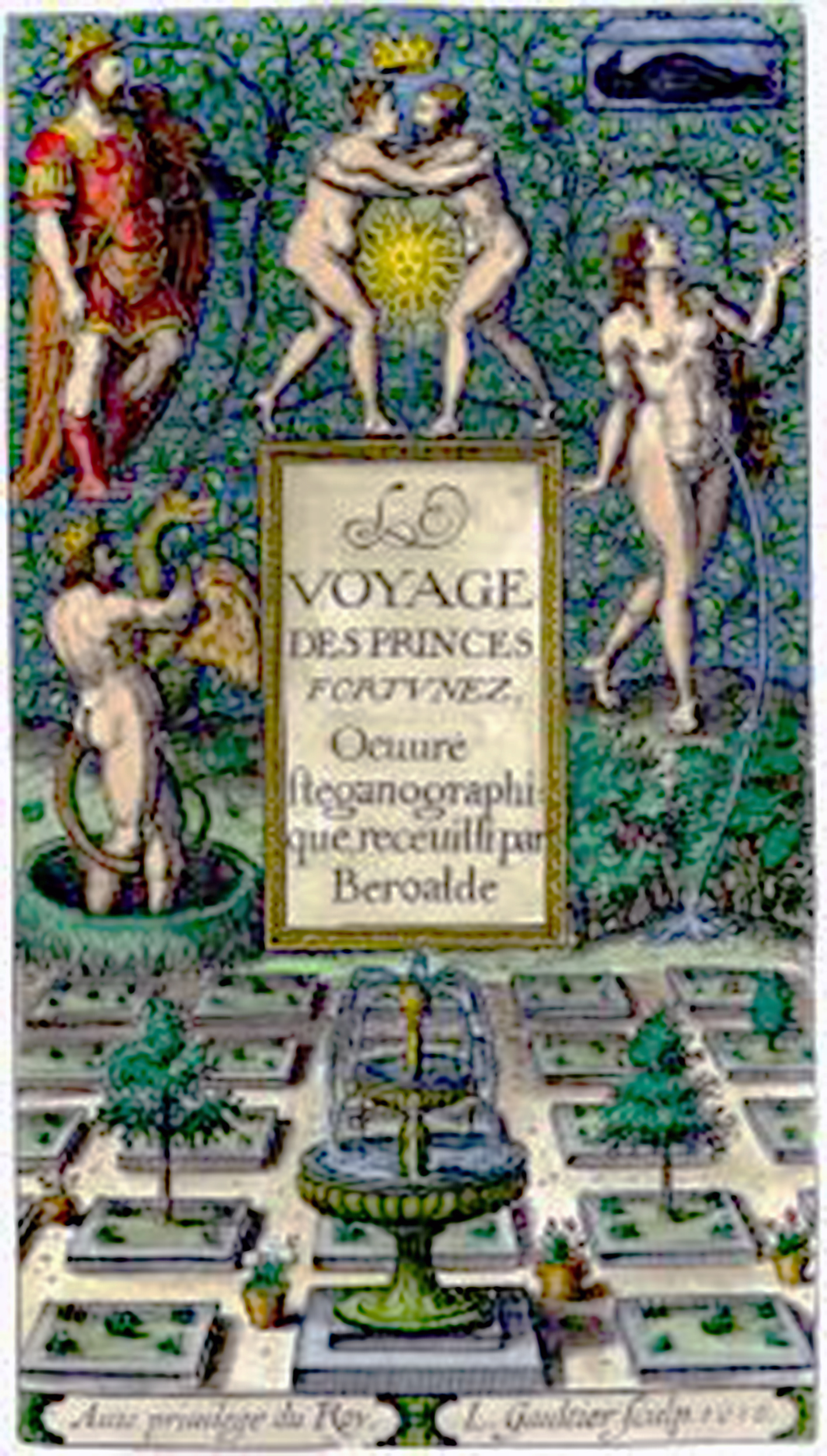 Фронтиспис первого издания "Путшествия удачливых принцев"